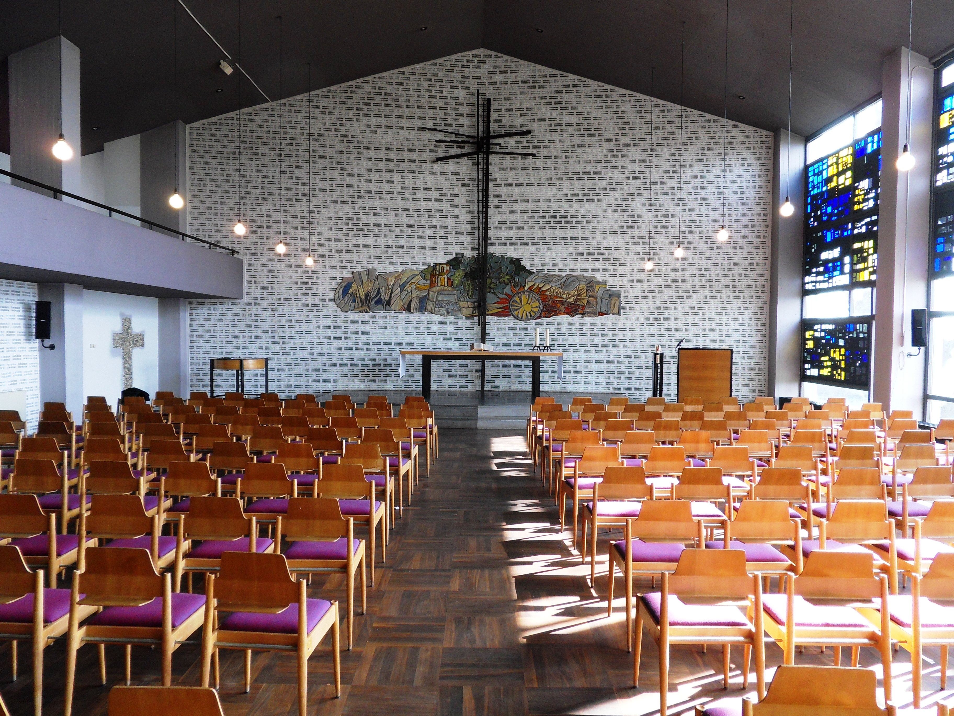 Innenansicht der Evangelischen Kirche Oestrich-Winkel in Mittelheim